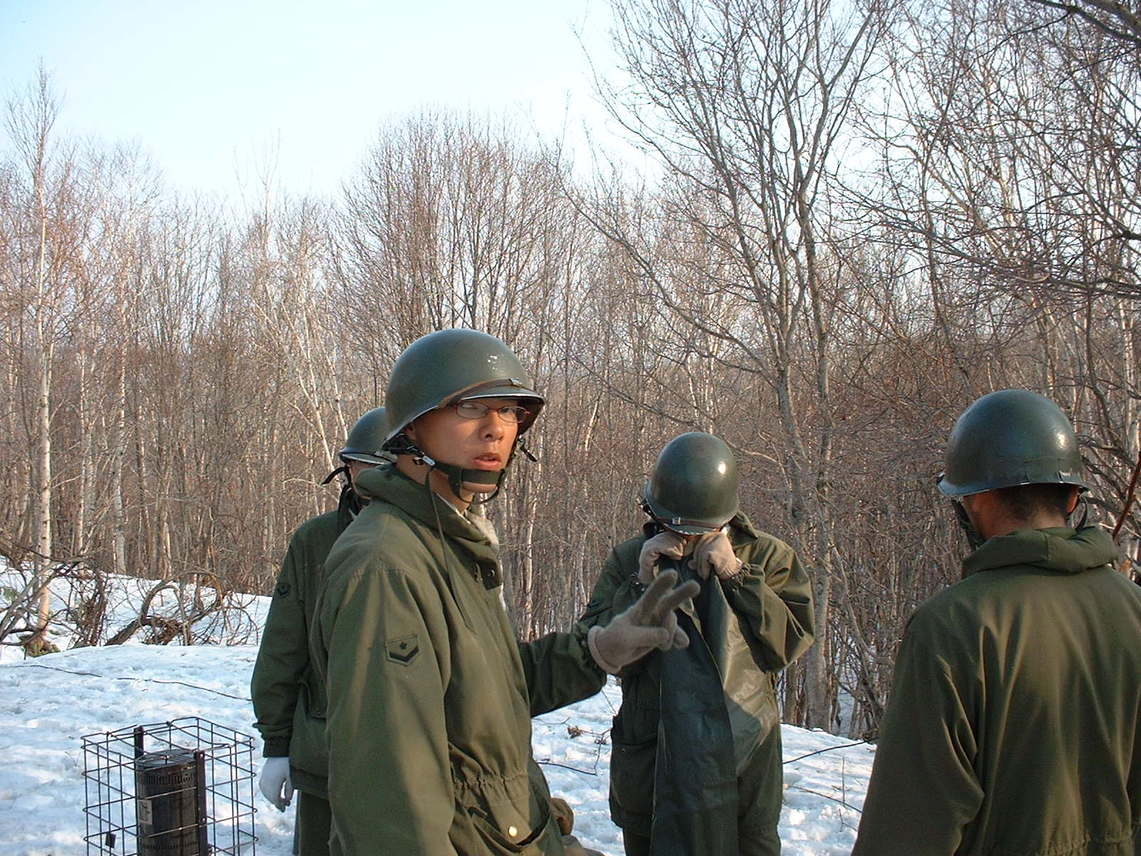 防寒外衣（旧型）、内側に白い生地が見えておりリバーシブルタイプであることが分かる。